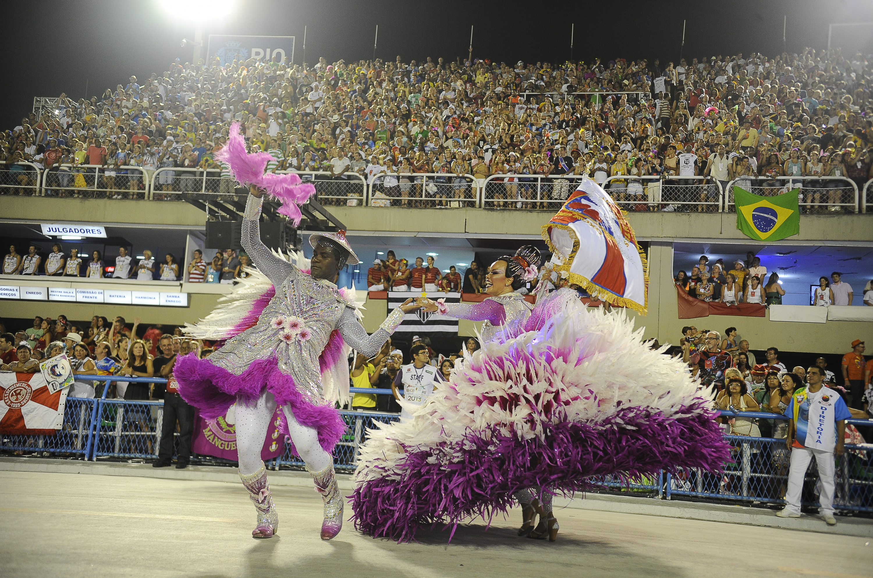 Rio de Janeiro- Inocentes de Belford Roxo abre os desfiles do primeiro dia de apresentações do Grupo Especial do Rio (Tânia Rêgo/ABr)